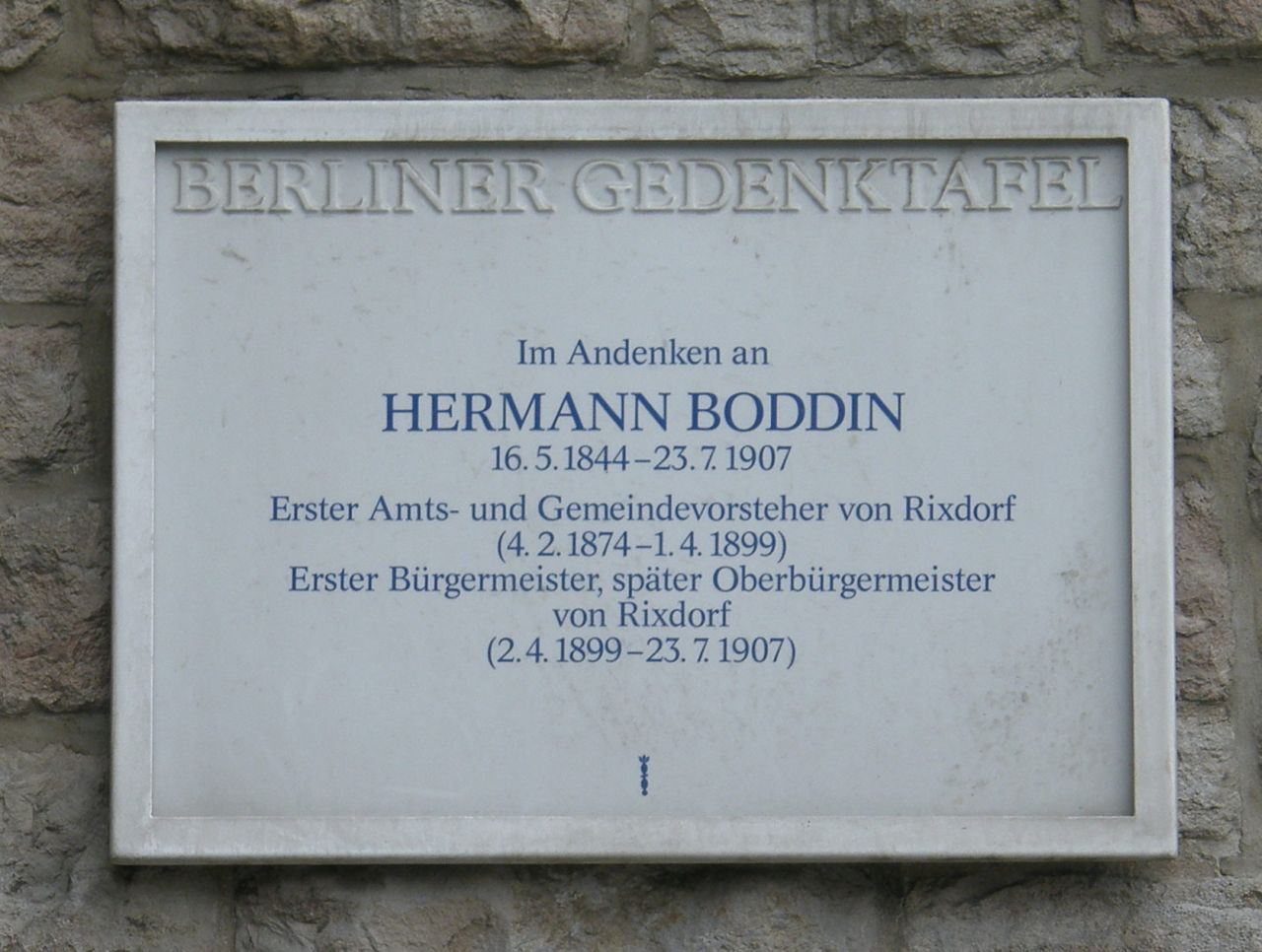 Berliner Gedenktafel für Hermann Boddin. Rathaus Neukölln, Karl-Marx-Straße 83, Berlin-Neukölln. Enthüllt am 16. Mai 1990